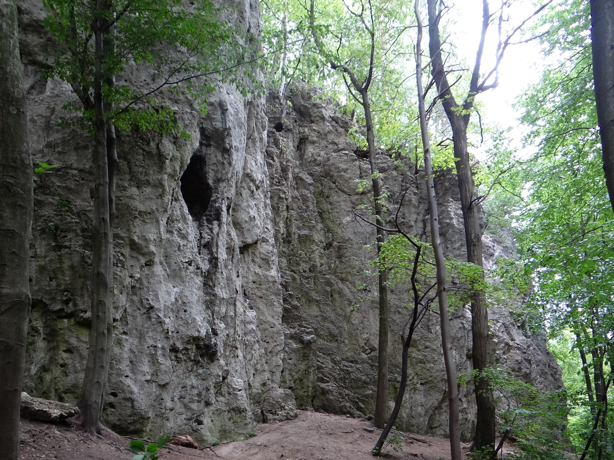 Skała Organy w Wąwozie Ostryszni w Imbramowicach